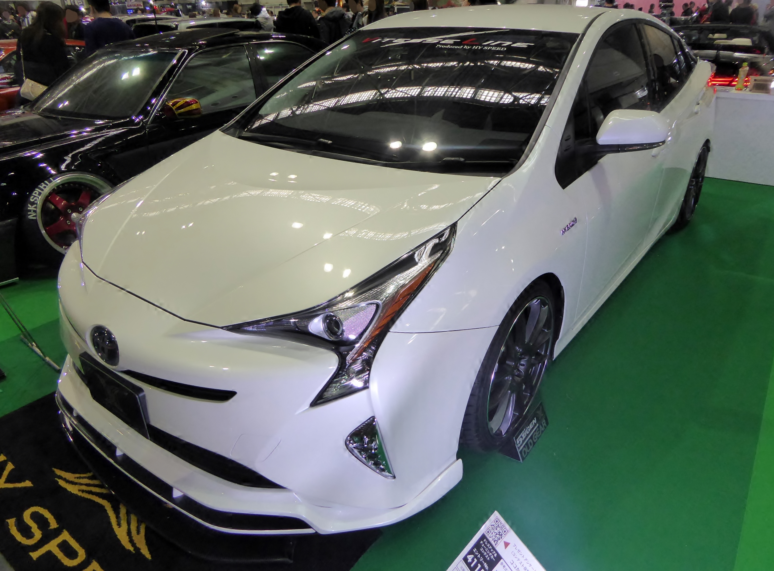 大阪オートメッセ2016においてVitesse LINEを撮影。